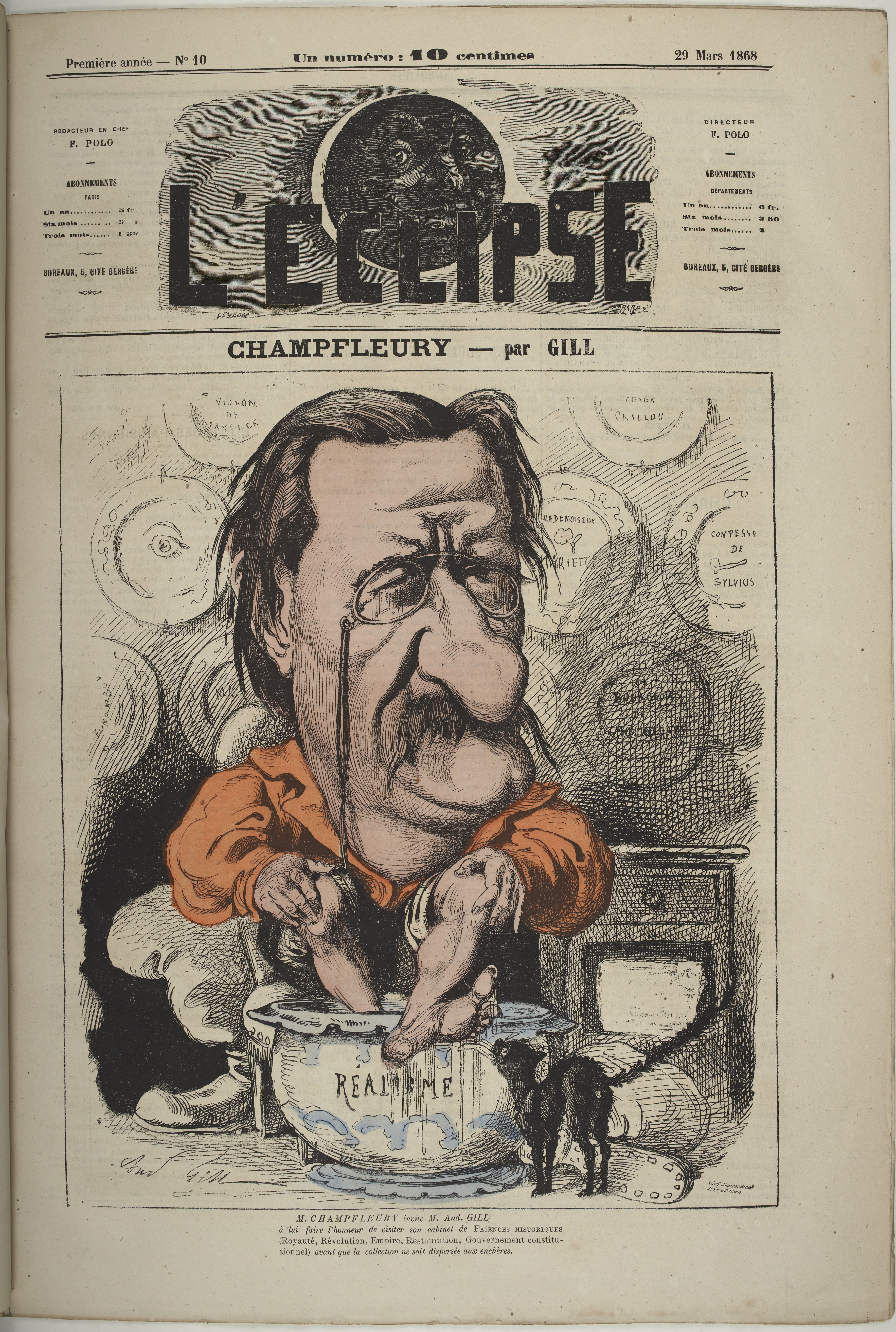 Dessin de André Gill, « Champfleury », L’Éclipse n° 10, 29 mars 1868